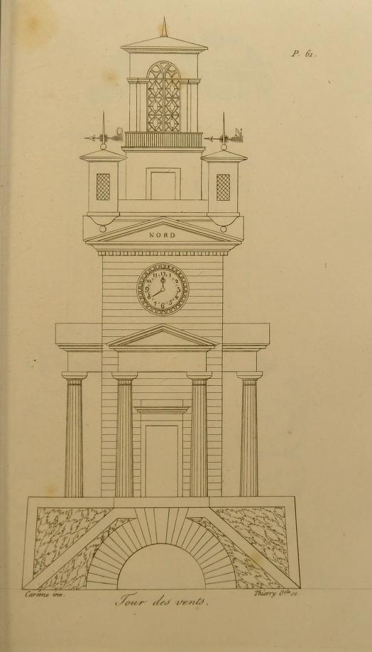 安東南‧卡漢姆的「裝置」藝術蛋糕設計圖樣